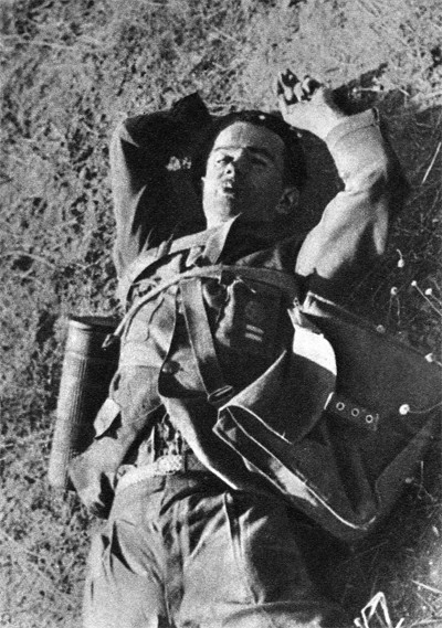 Srpskohrvatski / српскохрватски: Telo Blagoja Parovića, snimljeno neposredno nakon ubistva u Španiji.